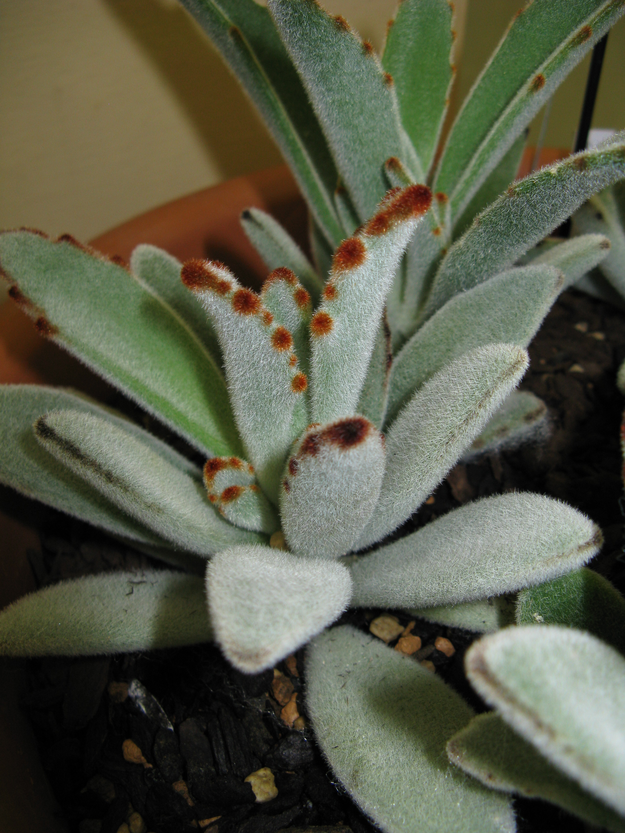 Scientific name Kalanchoe tomentosa